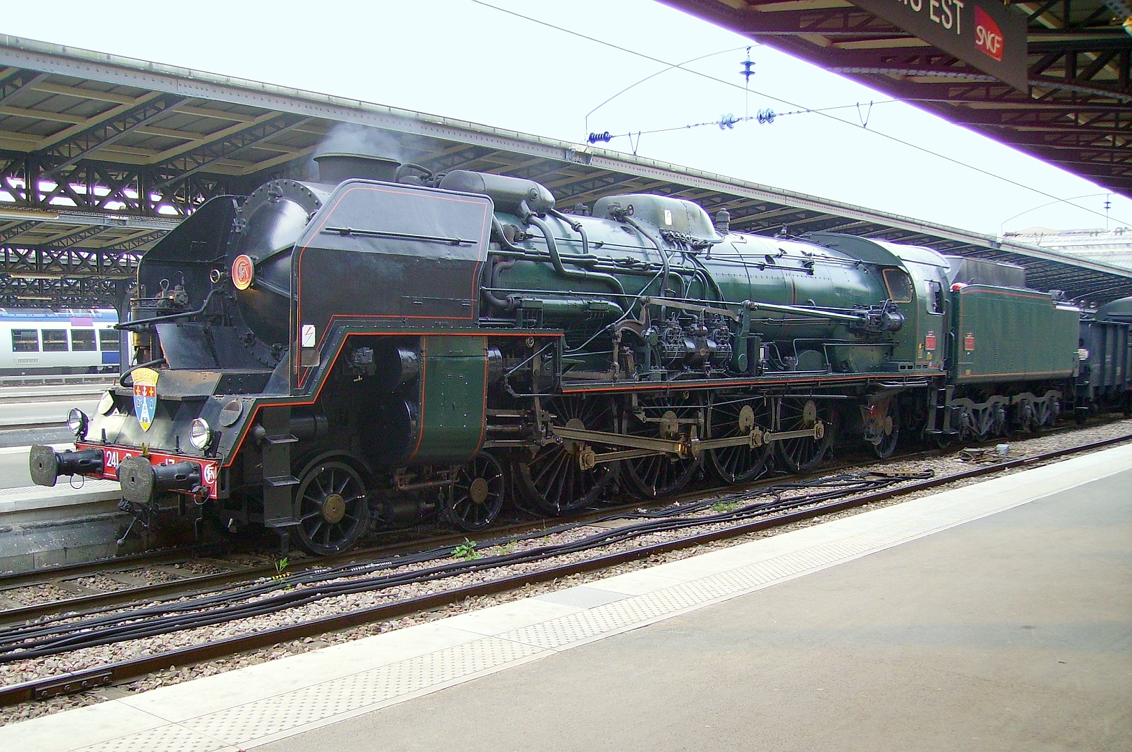 La 241 P 17 à Paris gare de l'Est le 8 mai 2010.